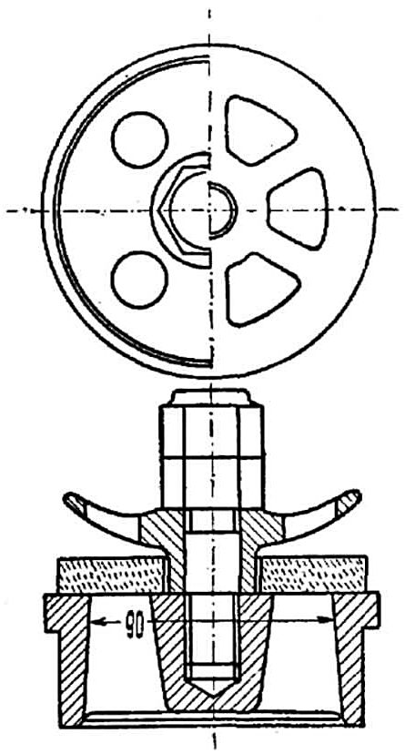 Die runde Gummiklappe biegt sich kugelschalenförmig auf bis an den Klappenfänger und schließt infolge der dem Stoff eignen Elastizität schnell und sanft.